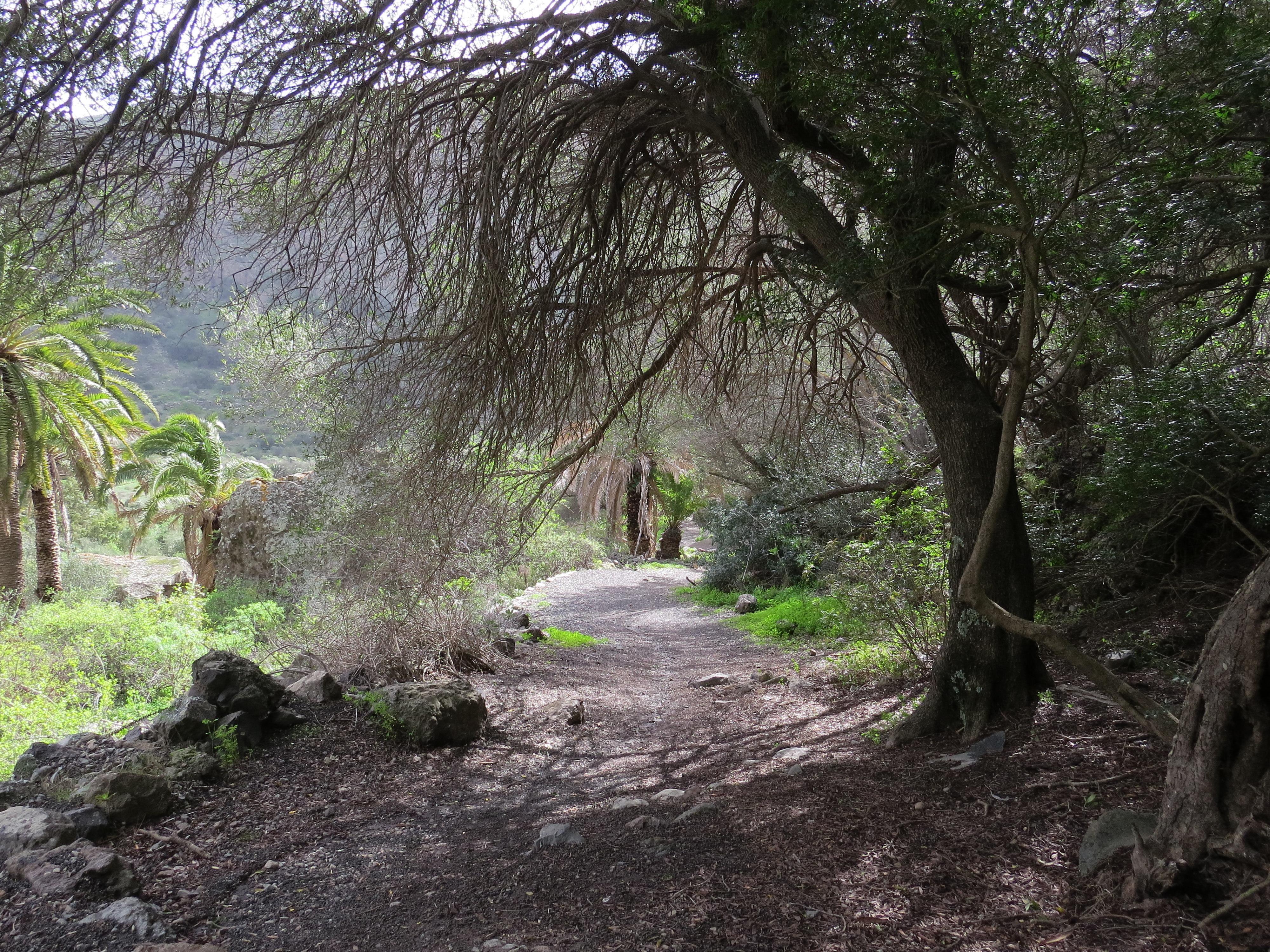 Senda que baja hacia el fondo de la caldera de Bandama. Gran Canaria, Islas Canarias, España